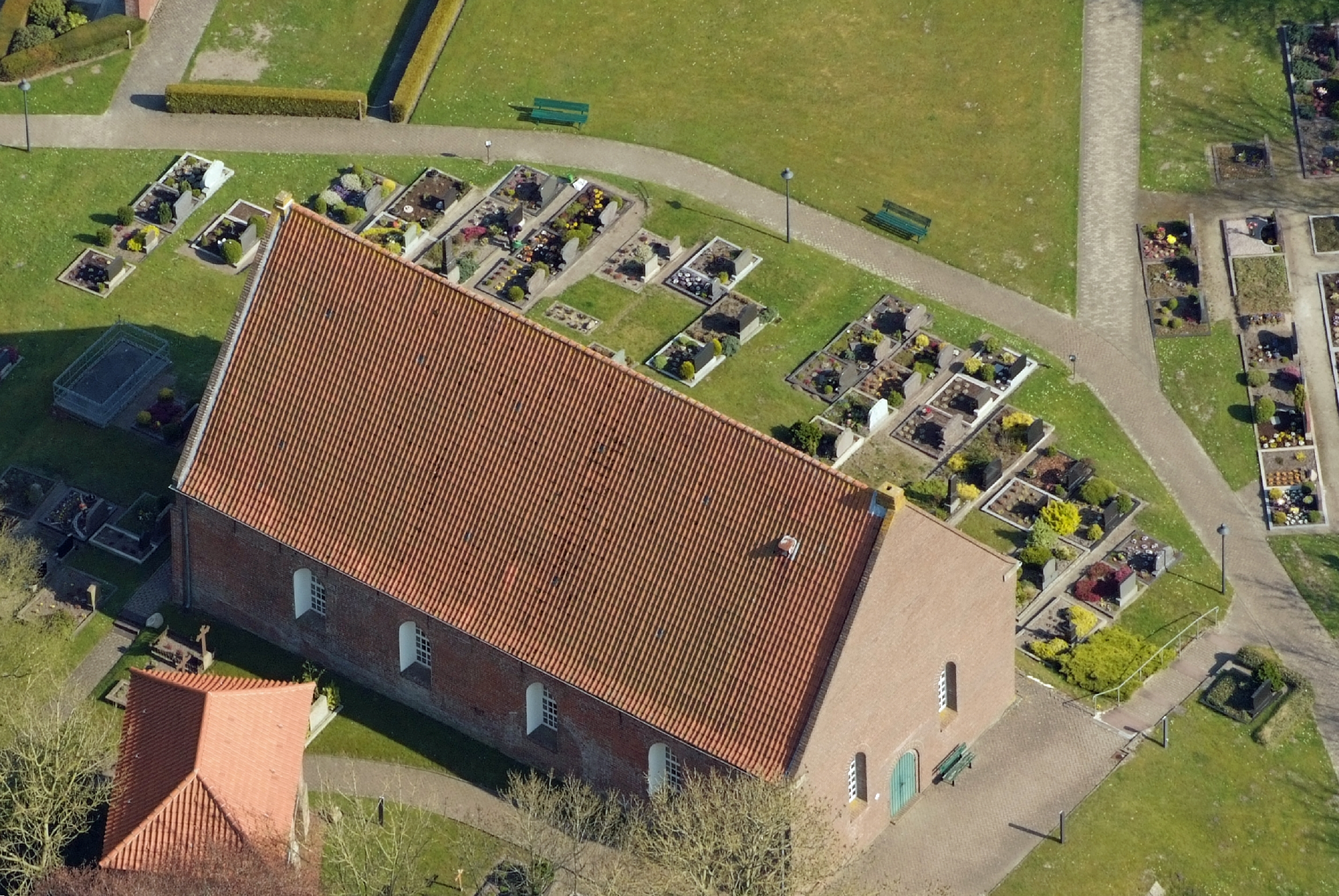 Fotoflug von Nordholz-Spieka nach Oldenburg und Papenburg